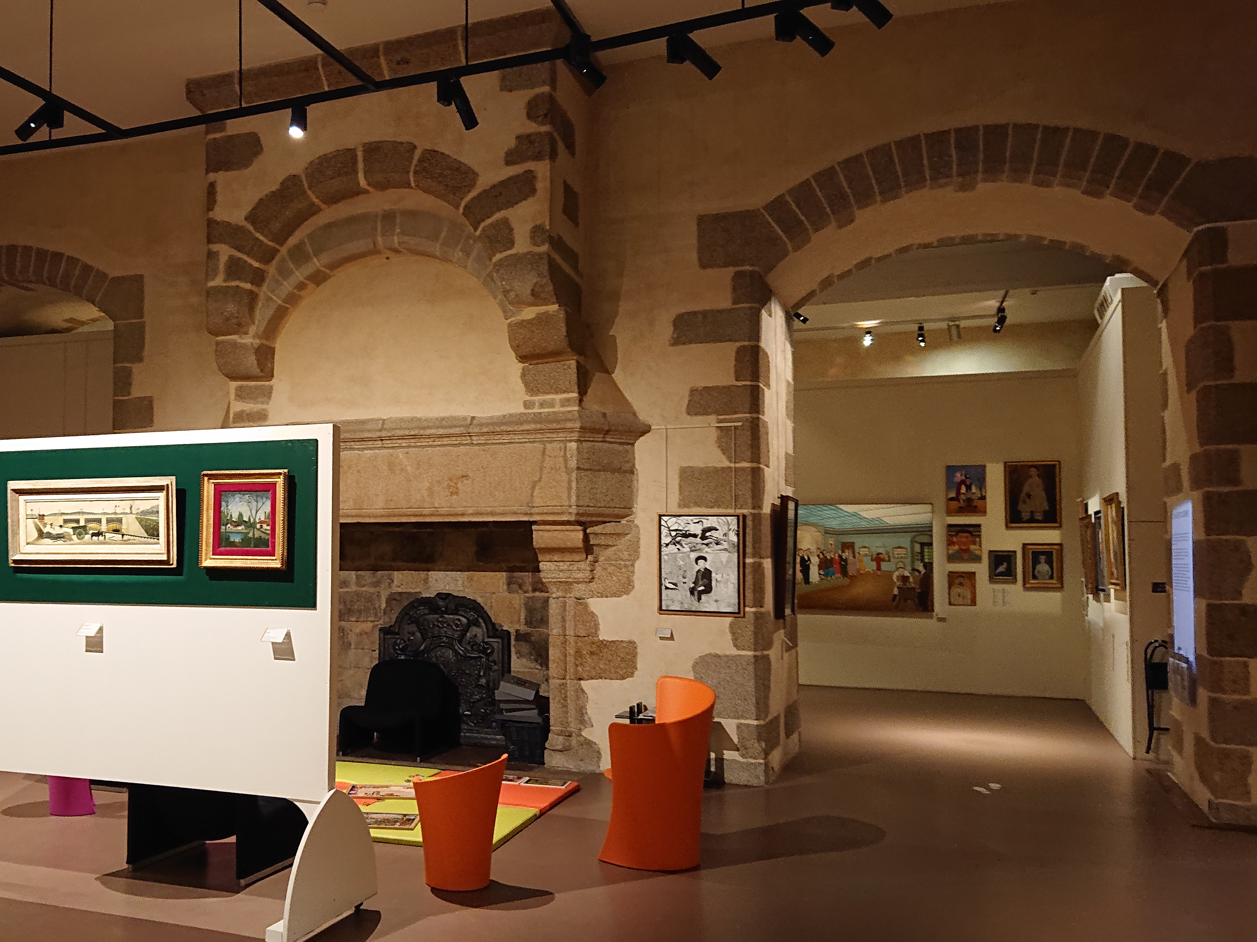 Salle du musée d'Art naïf et d'arts singuliers, Vieux-Château de Laval, France.